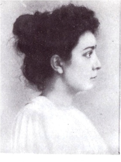 Myrtiotisa a los 16 años de edad